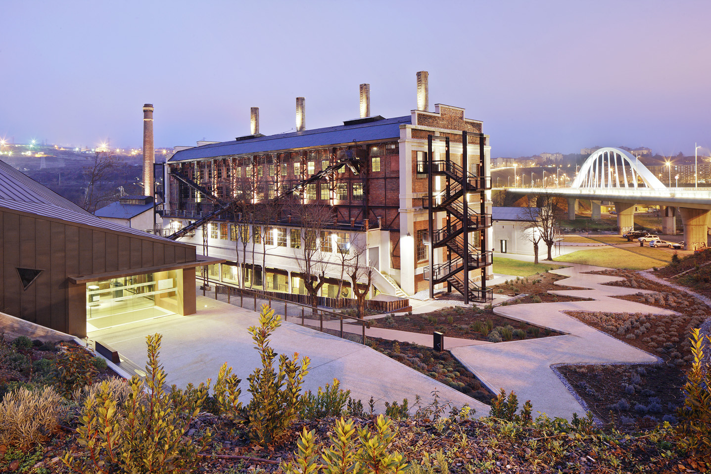 Ene.Museo Nacional de la Energía en Ponferrada